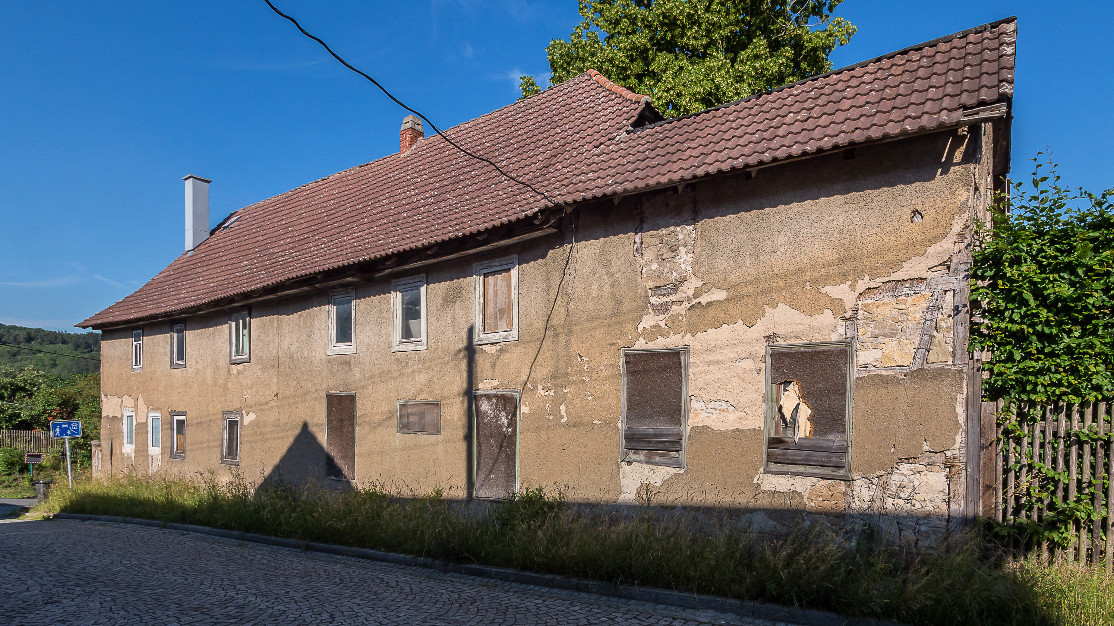 Hetschburg Haus Nr. 24 Wohnhaus